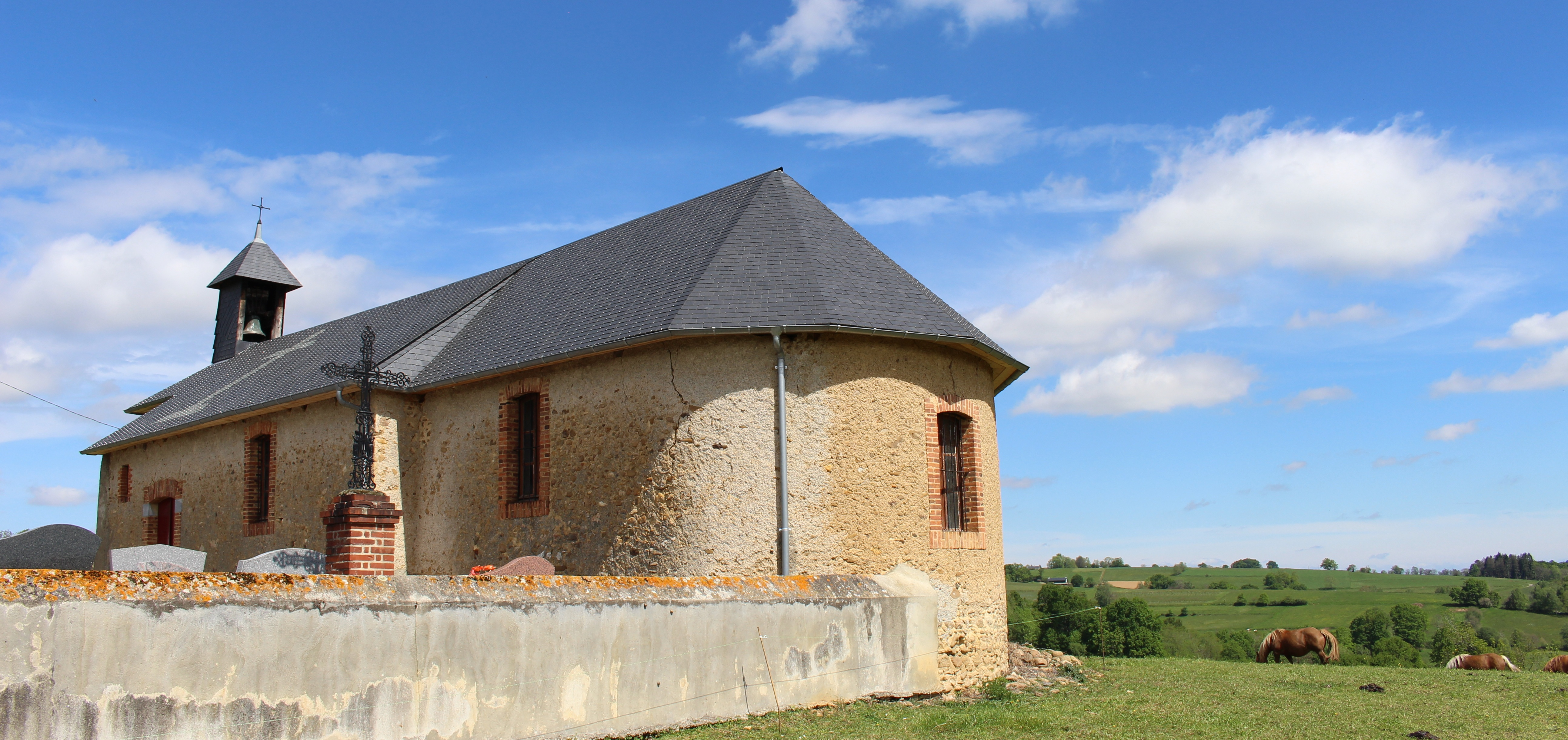 Chapelle de l'Arrêt de Bernac-Dessus (Hautes-Pyrénées)